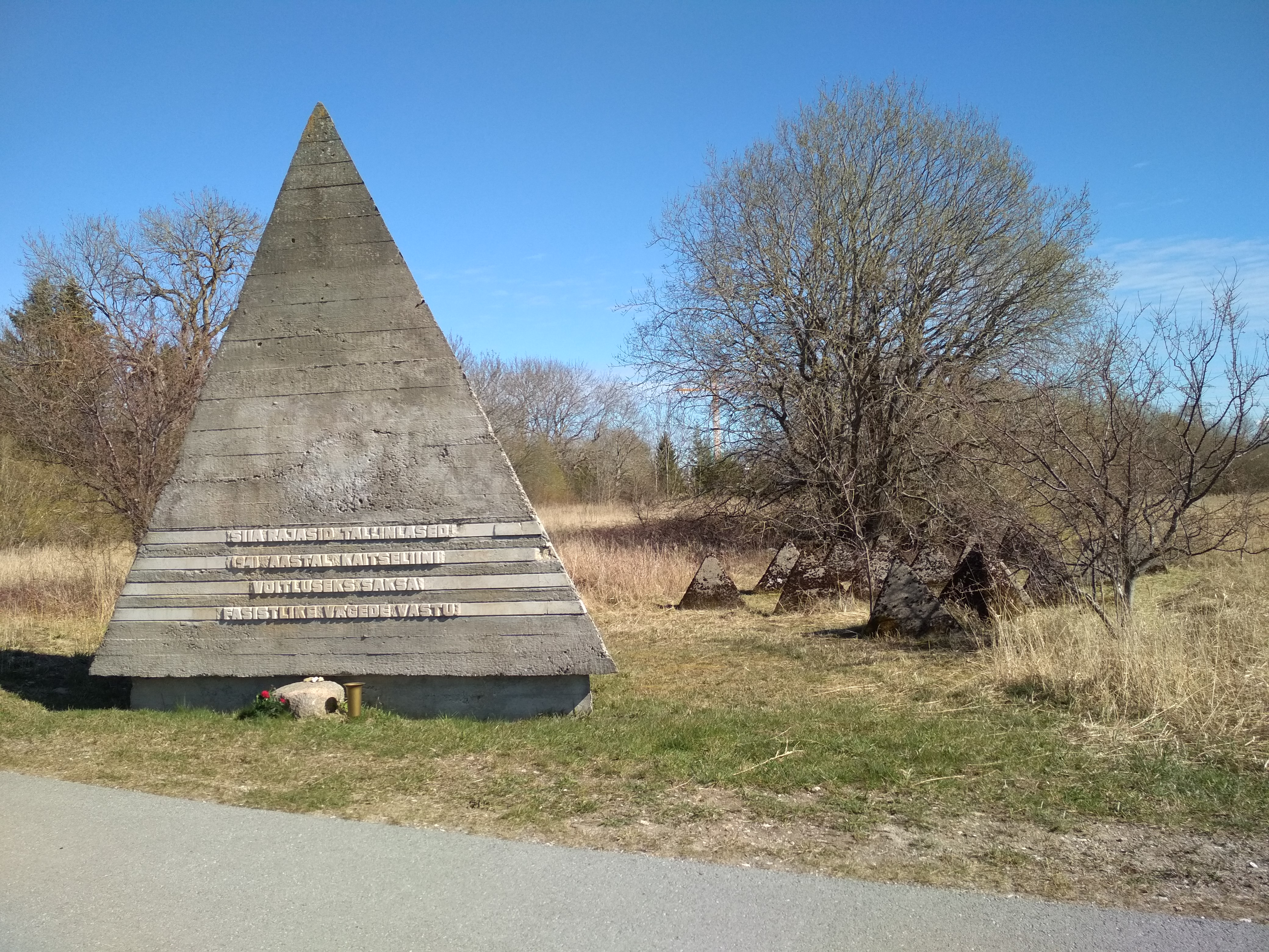 Monument Hüürus 1941. aasta kaitseliini kohal